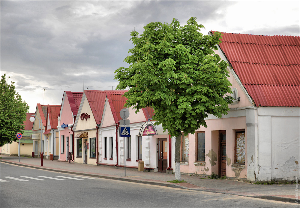 Цэнтр Ваўкавыска